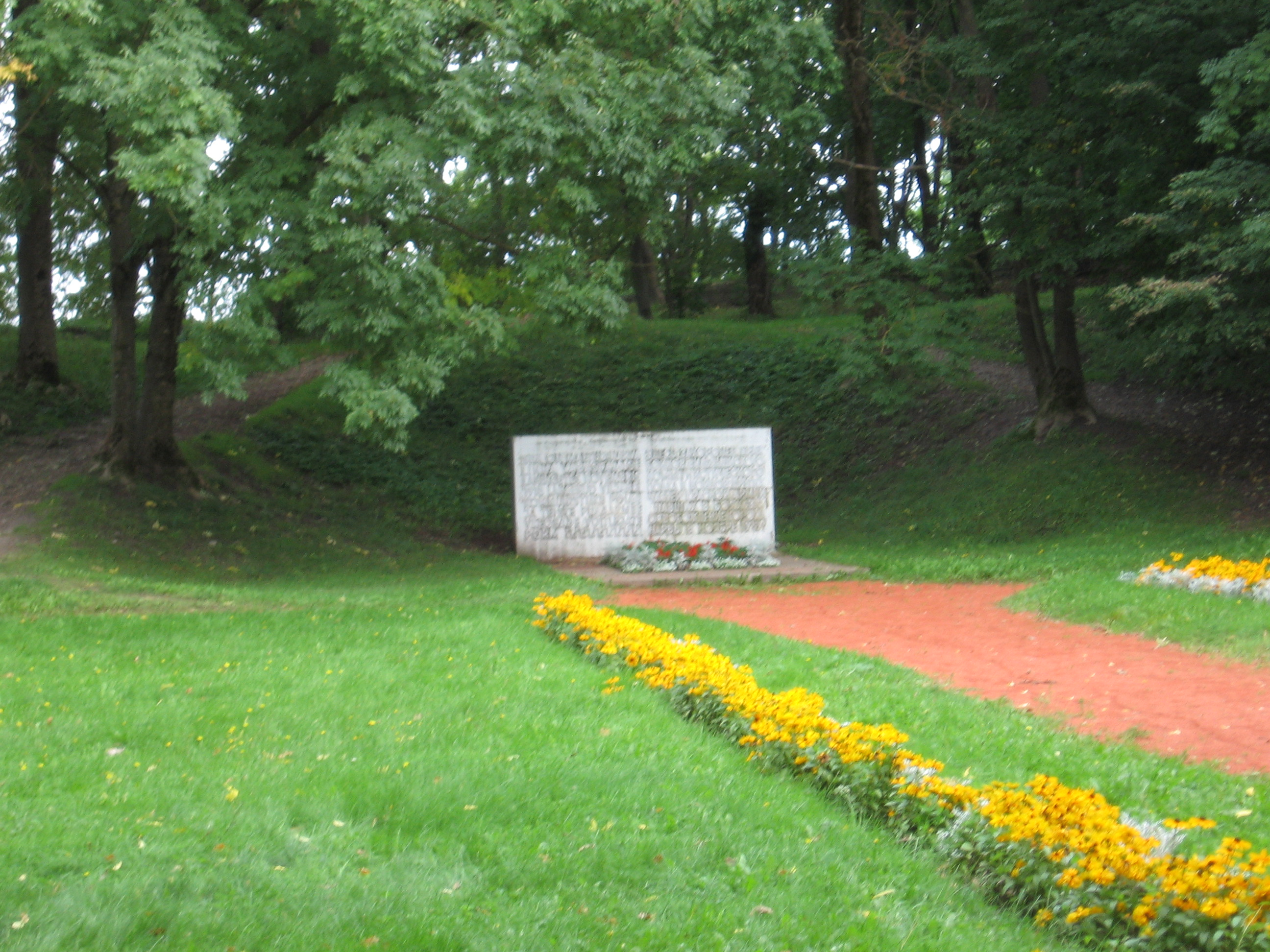 Vabadussõjas hukkunute ühishaud Narvas Pimeaias